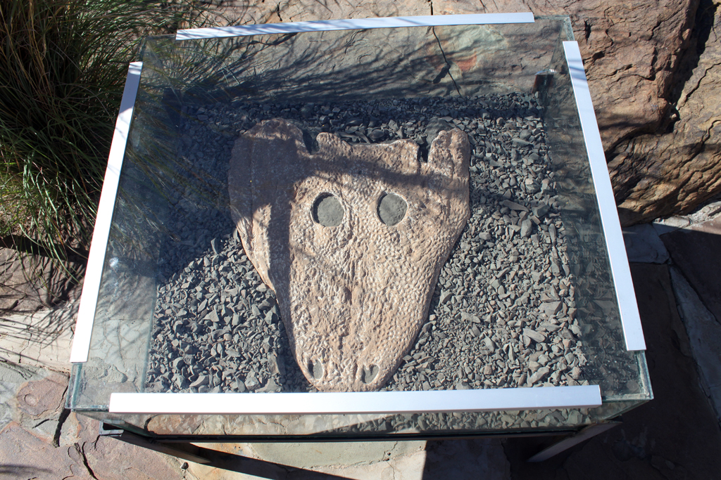 Rhinesuchus (Karoo temnospondyl)